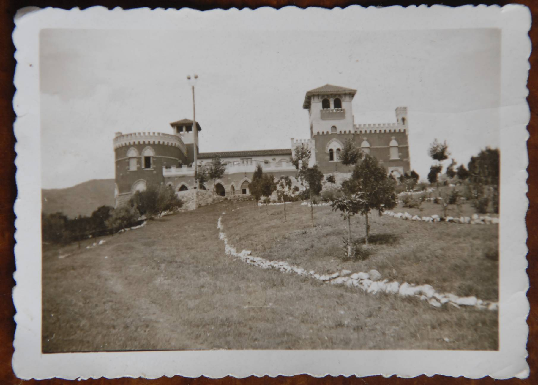 Casco de la Estancia Las Playas, ubicada en Valle Hermoso (Córdoba), Argentina.